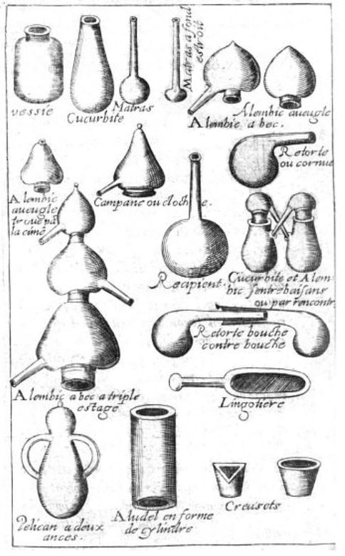 Cucurbite, matras, alambic et autres récipients de chimie de Jean Béguin, Les elemens de chymie, 1620